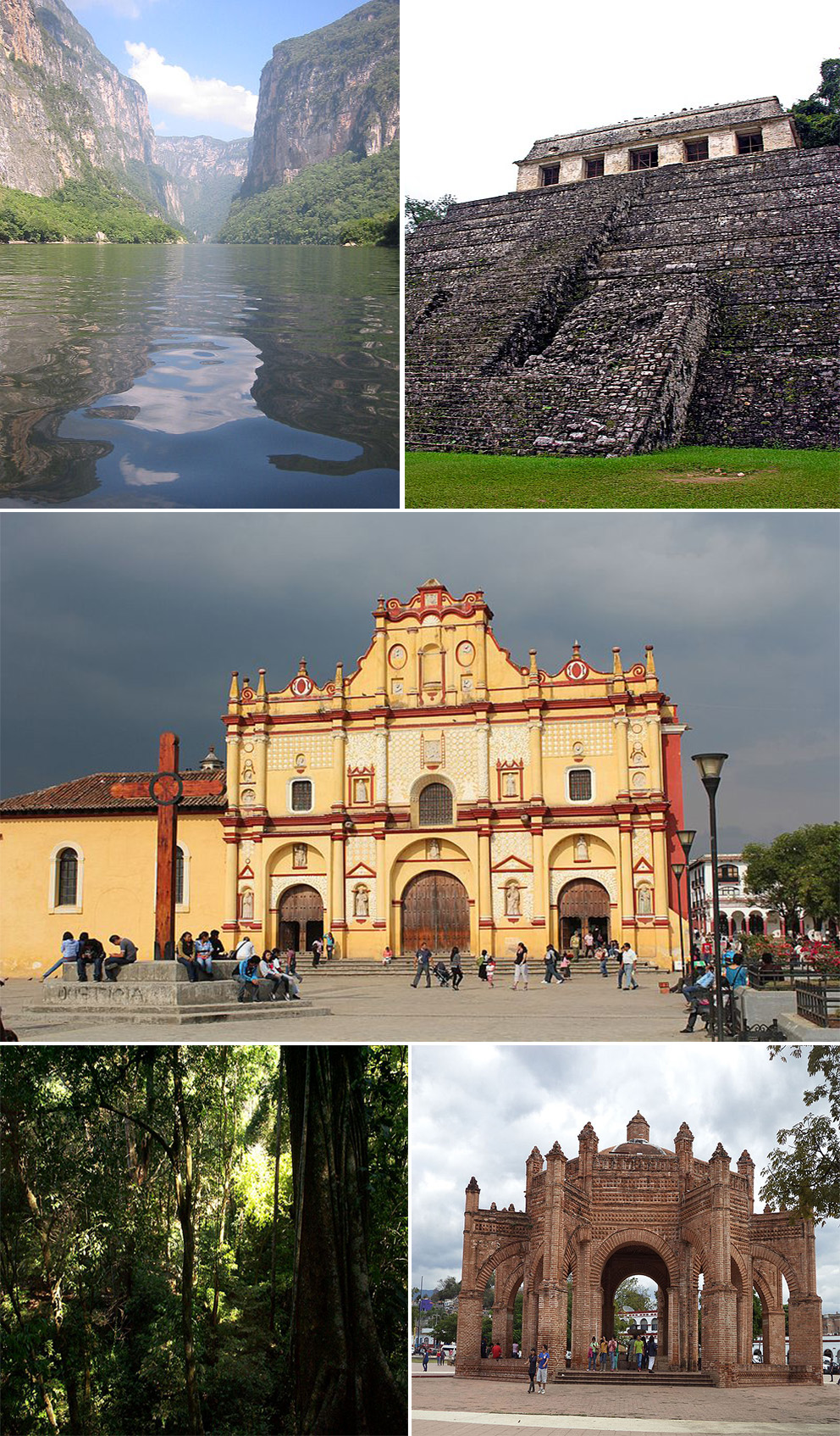 Montaje del Estado de Chiapas